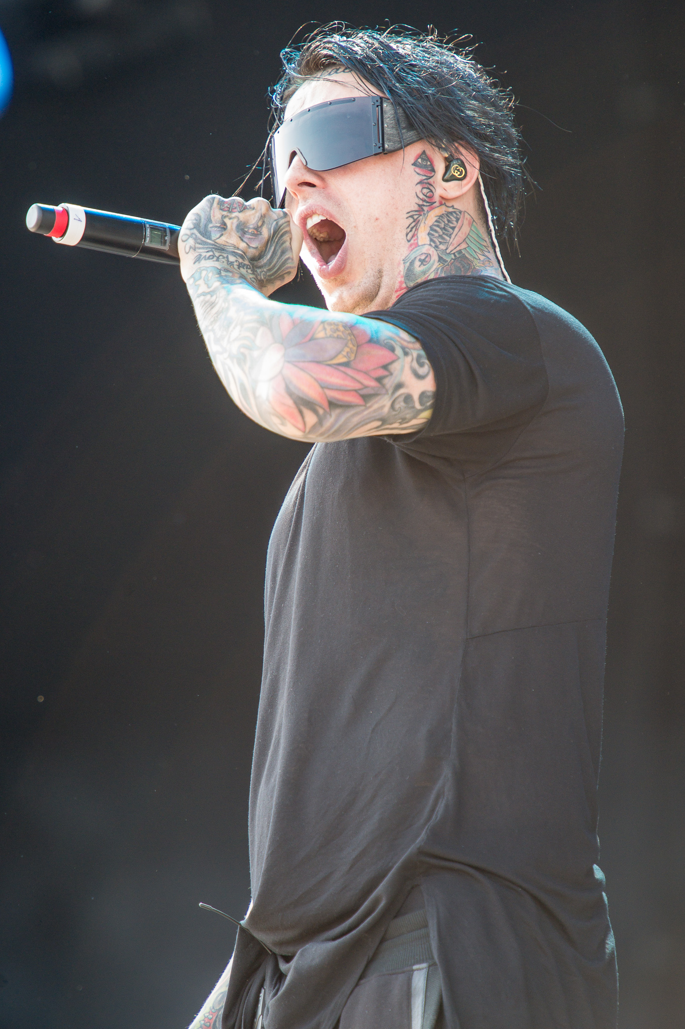 ARGO-Konzerte,Centerstage,Falling in Reverse,Konzert,Livekonzert,Livemusik,Musik,RiP,Rock im Park 2014,Ronnie Radke